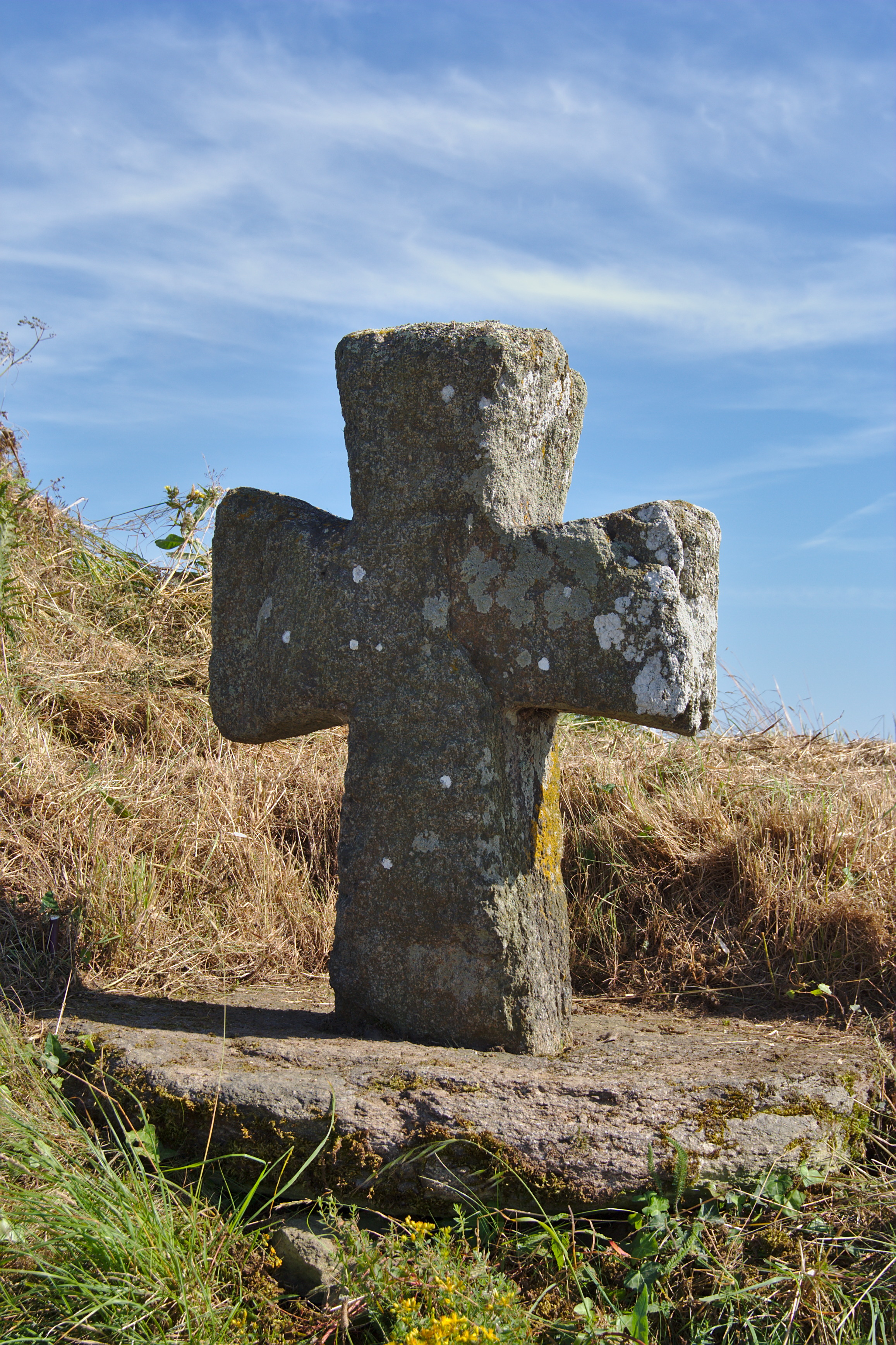 Croix de chemin médiévale des Courtils à Saint-Coulomb.